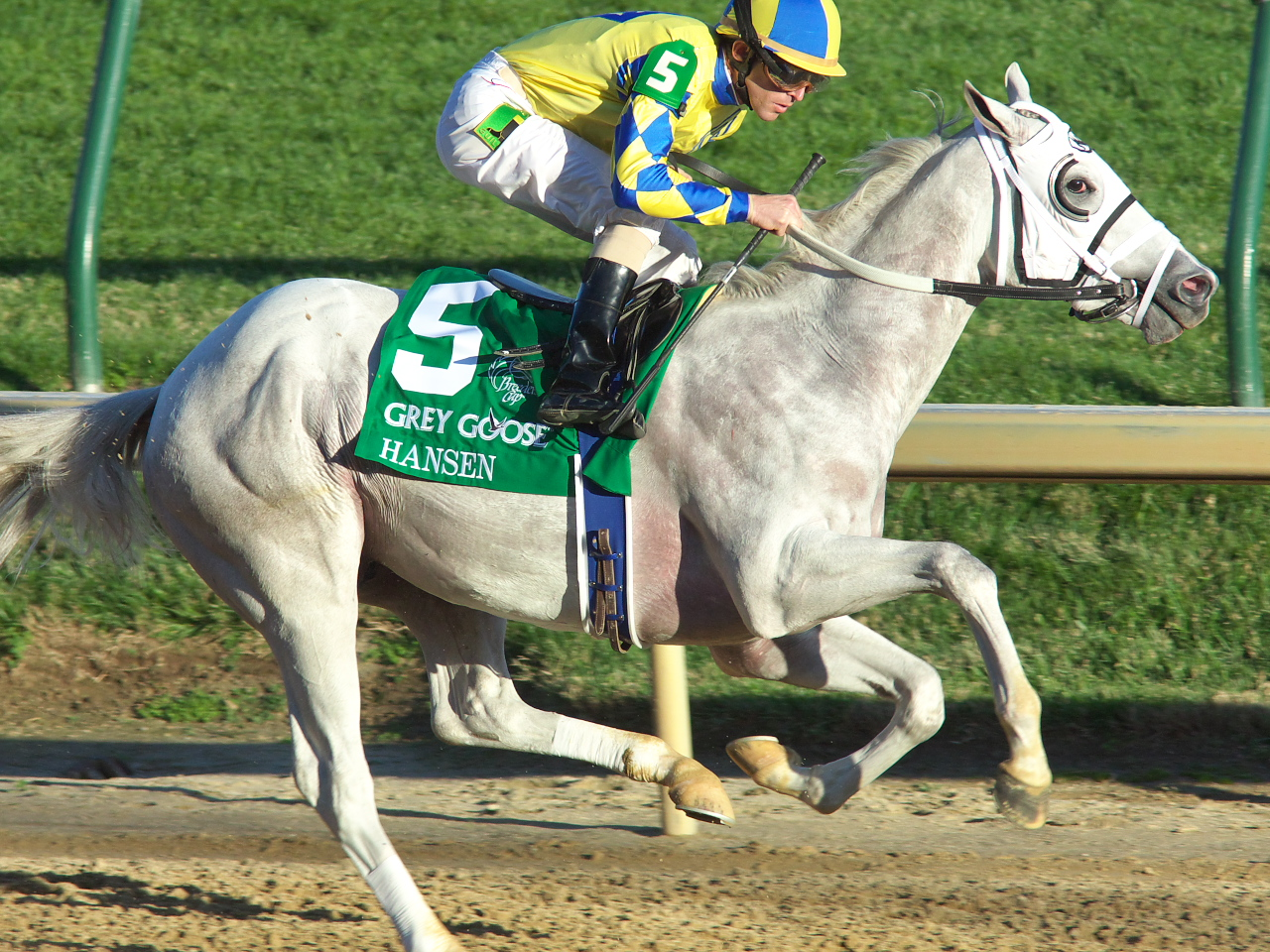 Hansen wins the 2011 Breeders' Cup Juvenile.